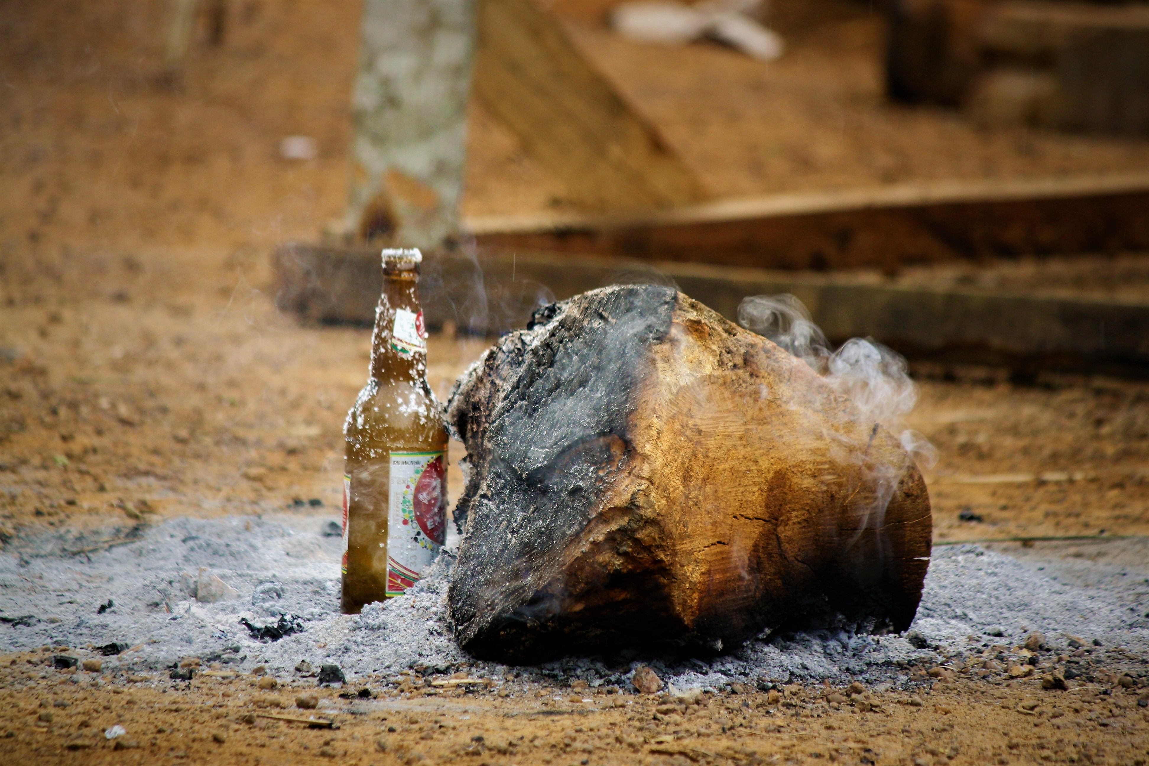 Sur cette photo repose le mystère de la météo une bouteille de prêt d'un feu suffit pour combattre la force de la nature (la pluie) technique pendant des manifestations pour arrêter la pluie.